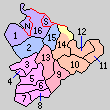 沖縄県島尻郡の町村。